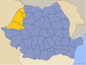 see here